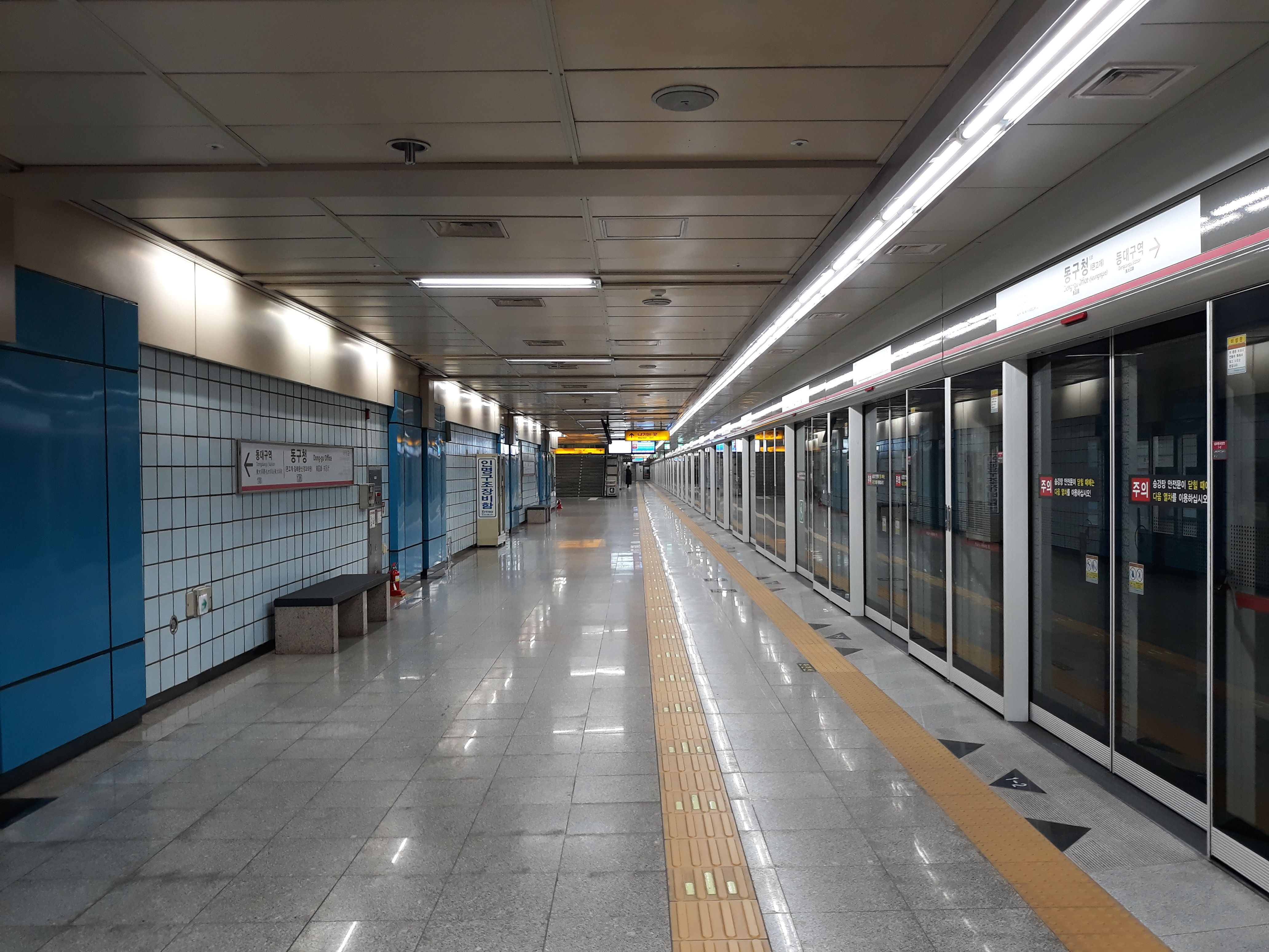 대구 도시철도 1호선 동구청역 설화명곡 방면 역명판